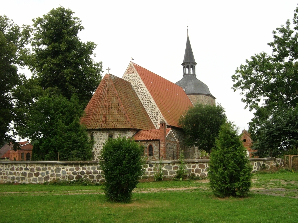 Die Kirche in Behren-Lübchin (Landkreis Güstrow, Mecklenburg-Vorpommern). Sie ist ein Feldsteinbau mit eingezogenem Chor und halbrunder, außen dreiseitiger Apsis aus dem 13. Jh. Der quadratische Turm wurde etwas später vorgesetzt. Er ist breiter als das Schiff. Sein achteckiger Aufsatz mit geschweifter Haube und Laterne ist barock. (Quelle: Die Bau- und Kunstdenkmale in der DDR, Teil Bezirk Neubrandenburg - Henschelverlag Kunst und Gesellschaft - 1982)